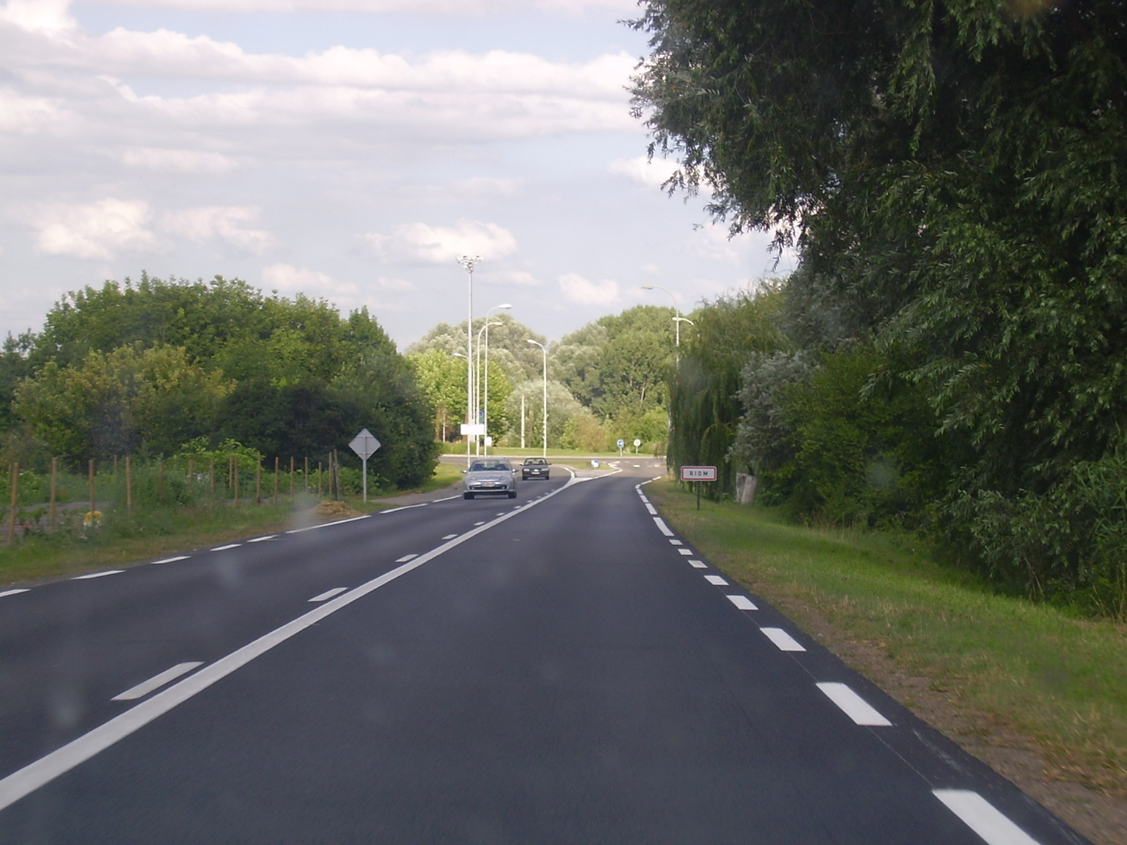 La RD 446 (contournement ouest de Riom) entre dans Riom, Puy-de-Dôme, Auvergne, France. Direction est.